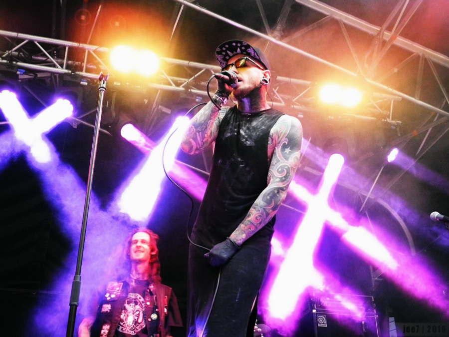 Artist Dmitry Darling esinemas ansamblis Freakangel muusikafestivalil Hard Rock Laager 2019.